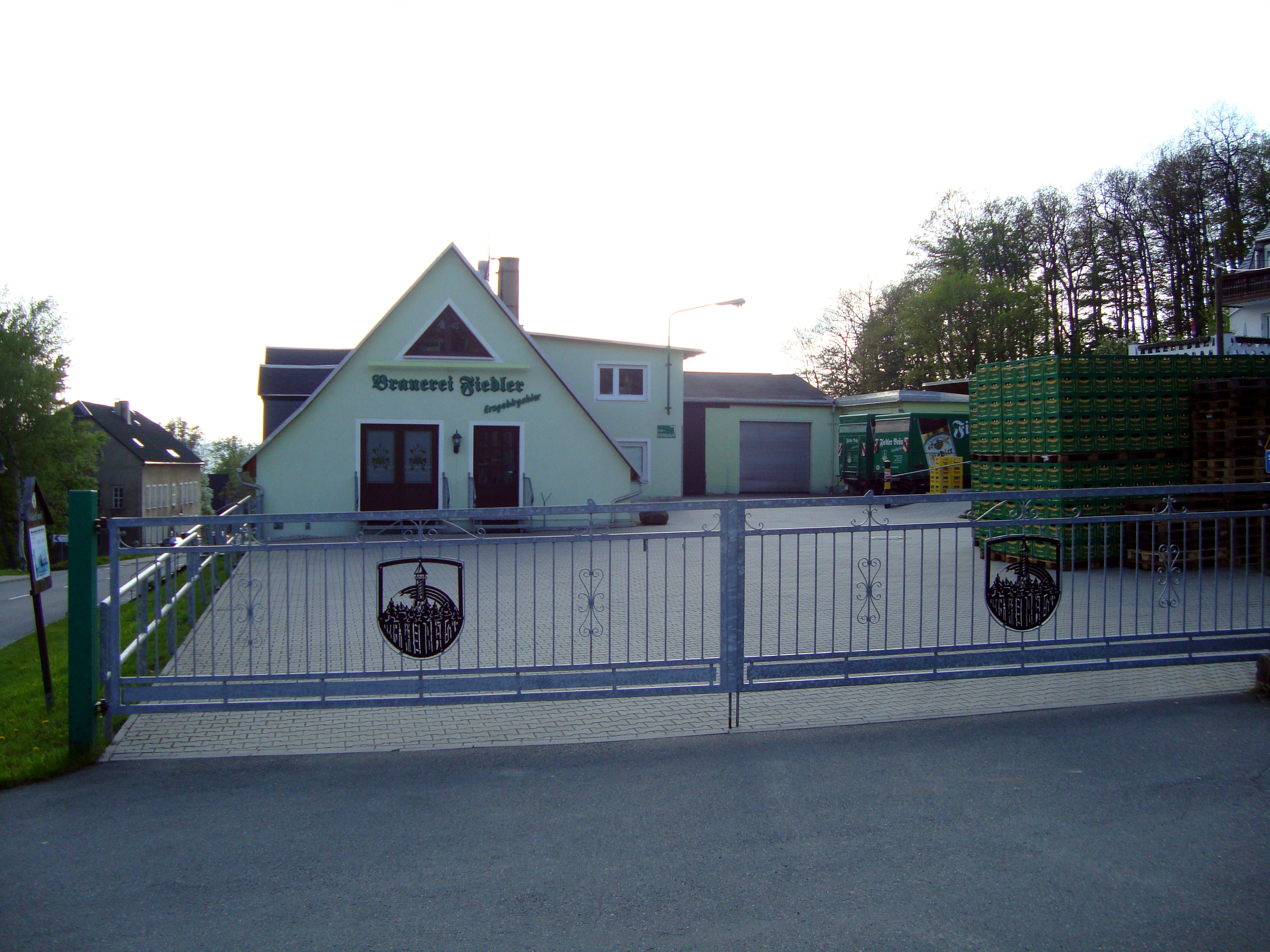 Privatbrauerei Fiedler in Oberscheibe im Erzgebirge